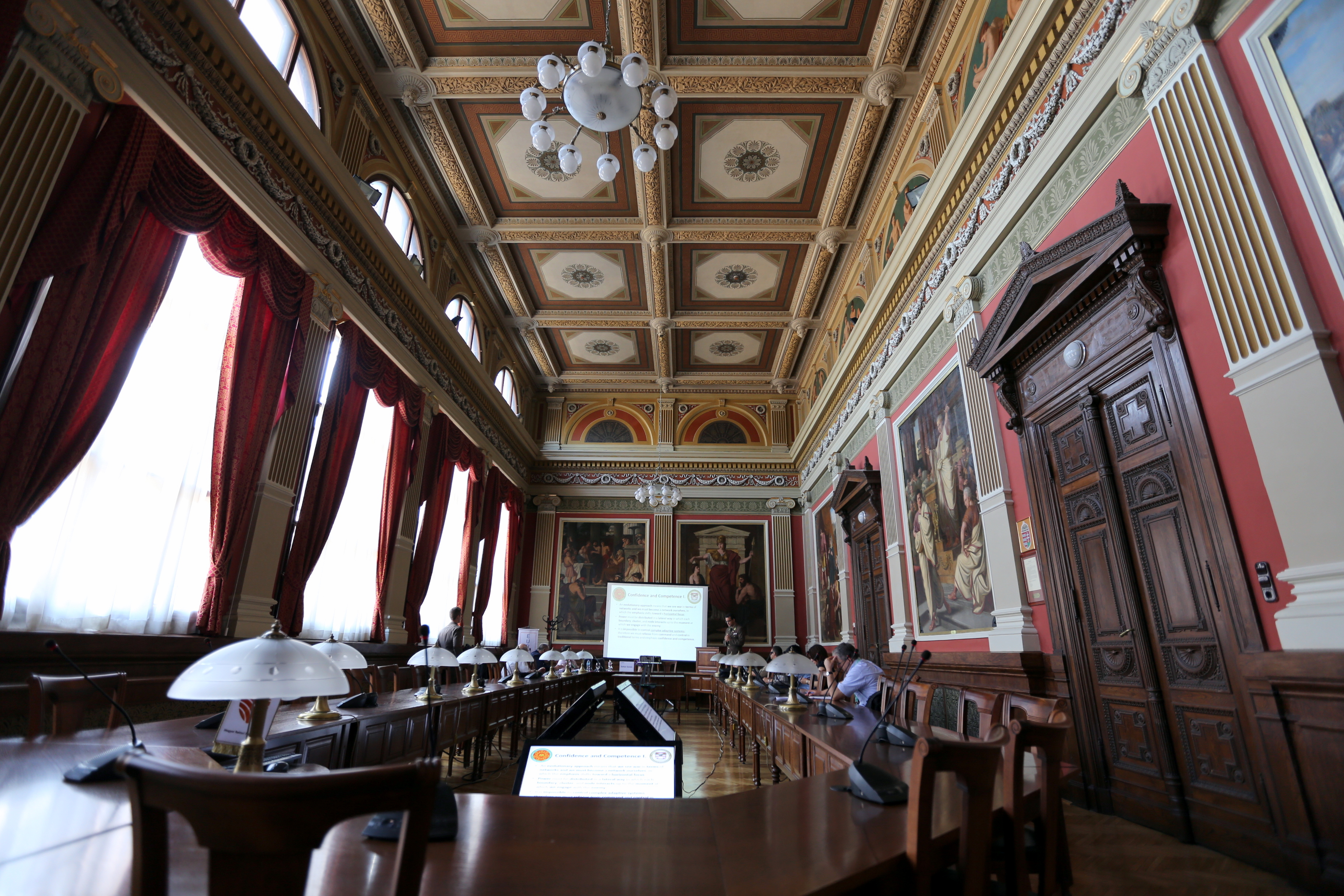 iskola This is a photo of a monument in Hungary. Identifier: 527